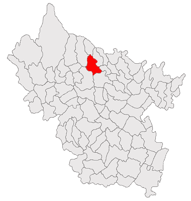 Categorie:Hărţi ale judeţului Buzău